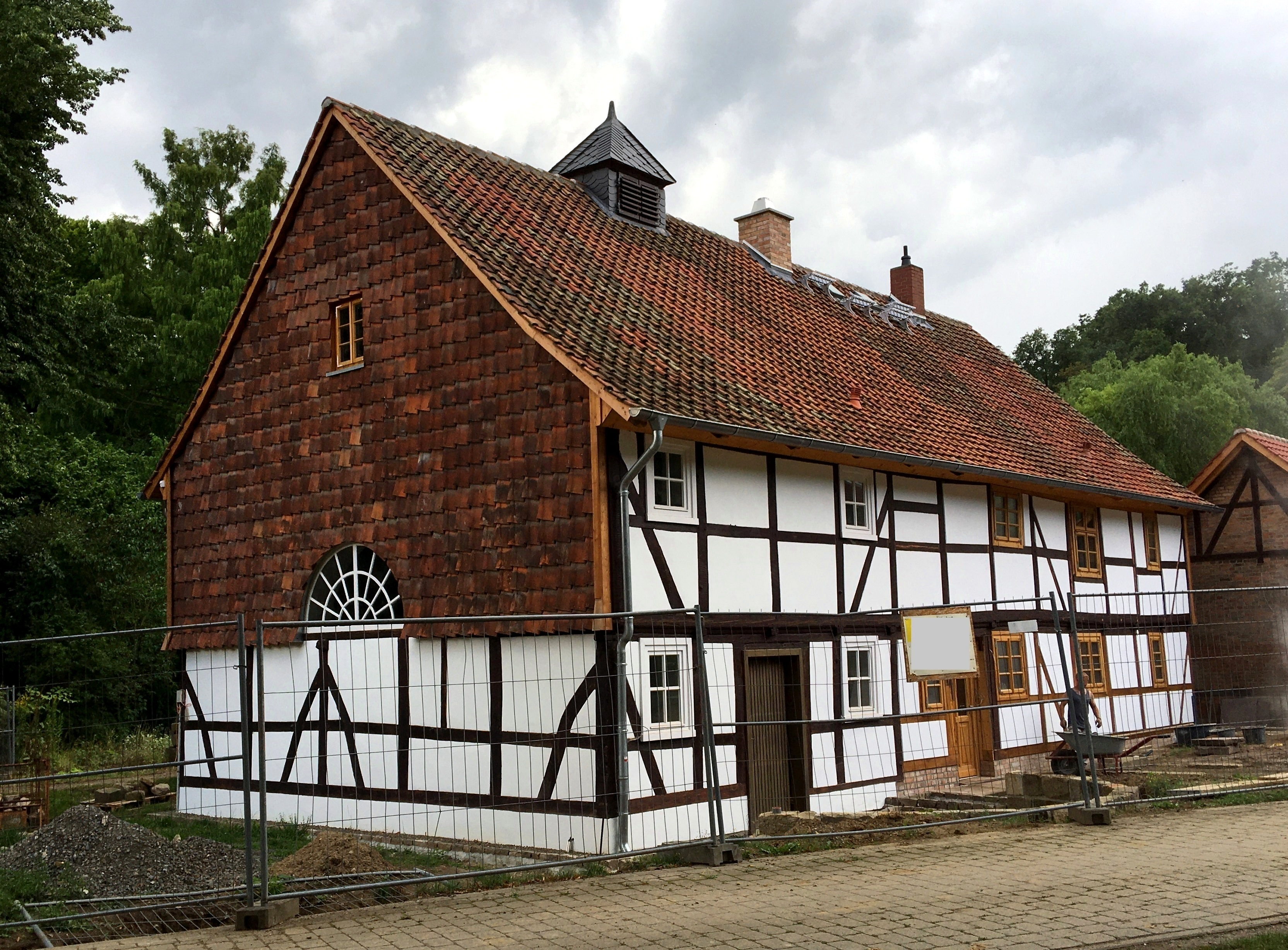 Kapellenhaus Altenrode (Schladen-Werla), Nordostansicht